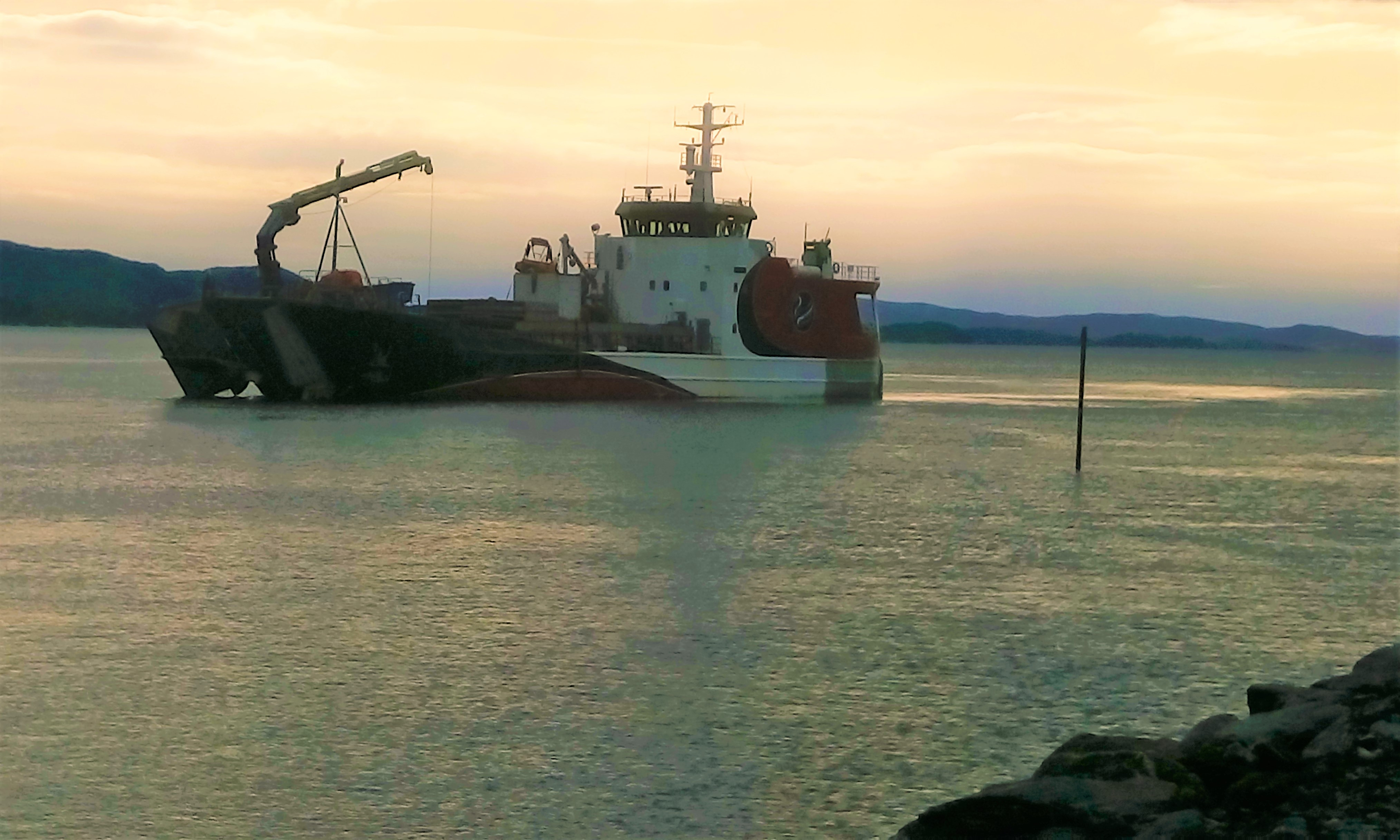 MS Sørøysund utenfor Stordbase